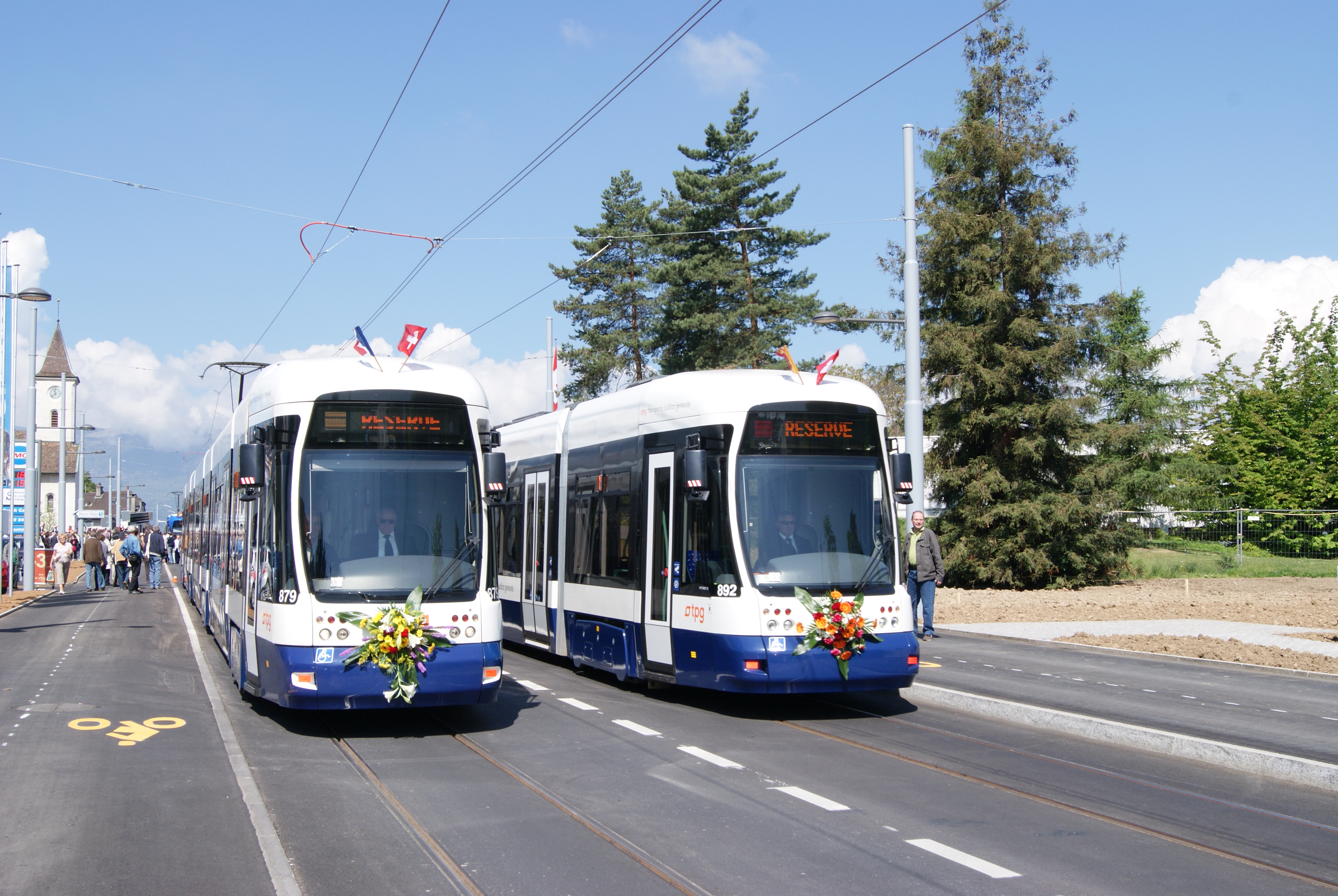 Photo: Trams aux Fils. Samedi 30 avril 2011 a été inauguré le prolongement de la ligne 18, Bois-du-Lan Cern, soit 2.5 kilomètres. Les deux trams ont circulés en parallèles sur le parcour prolongé.De ce fait, la ligne de bus 56 a été supprimée depuis le 02-04-2011.